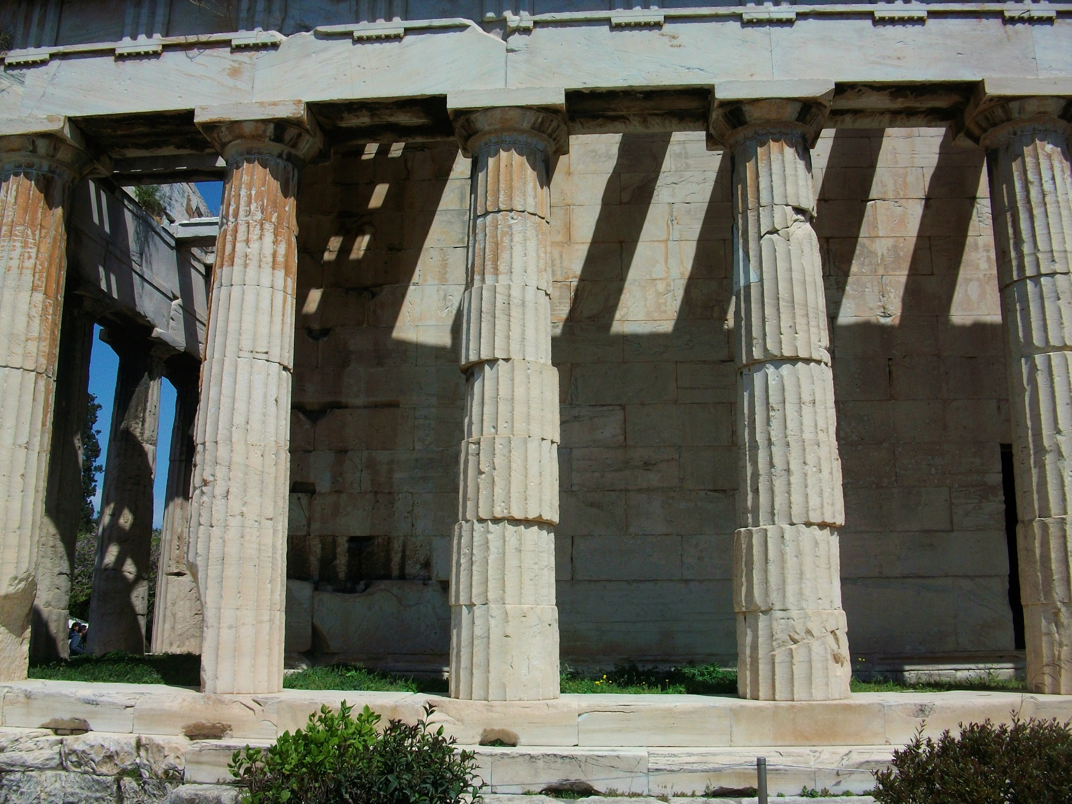 Columnes del temple d'Hefest a l'àgora d'Atenes.